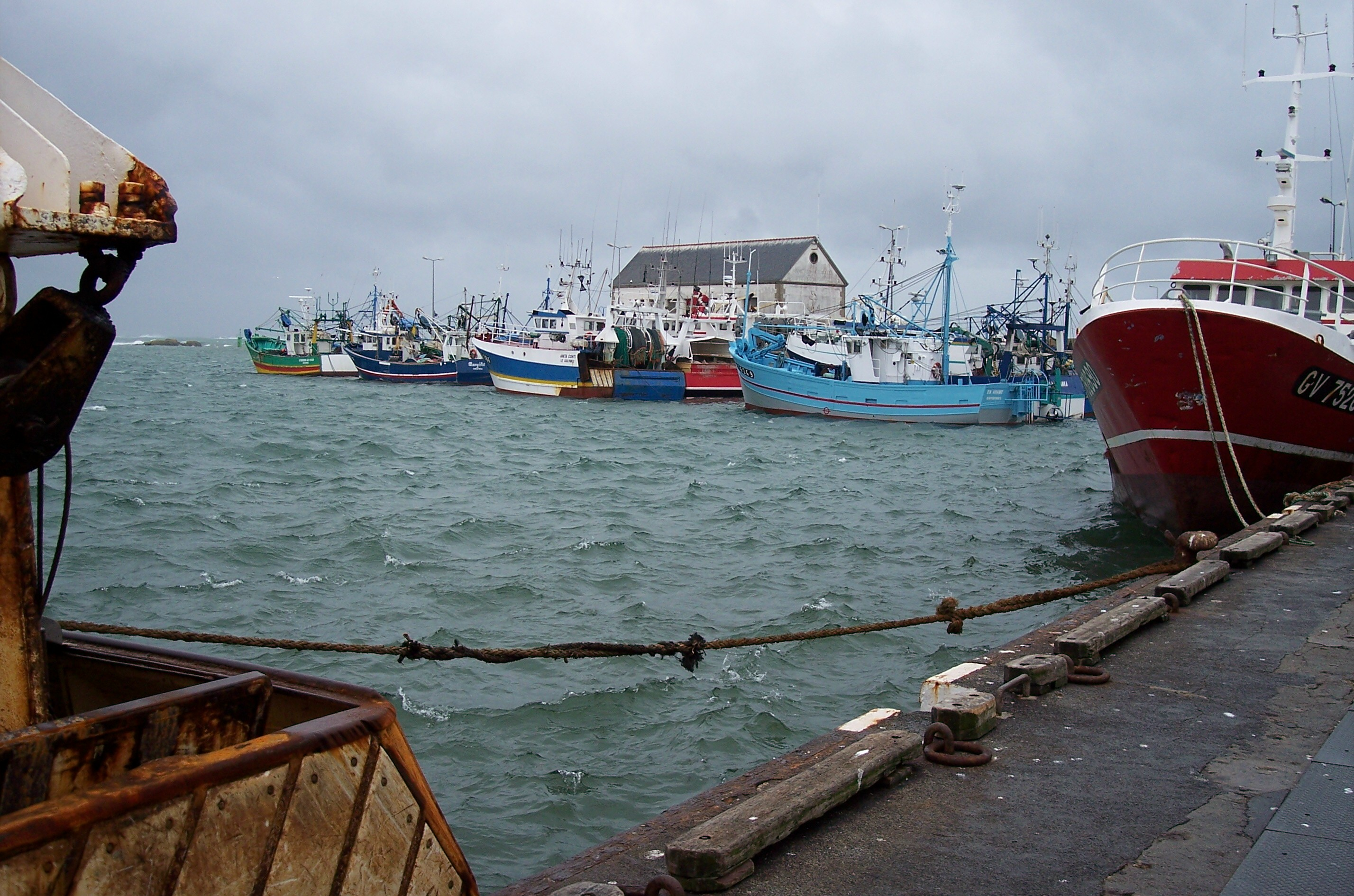 le port de Saint-Guénolé - janvier 2006 - photo Henri Camus